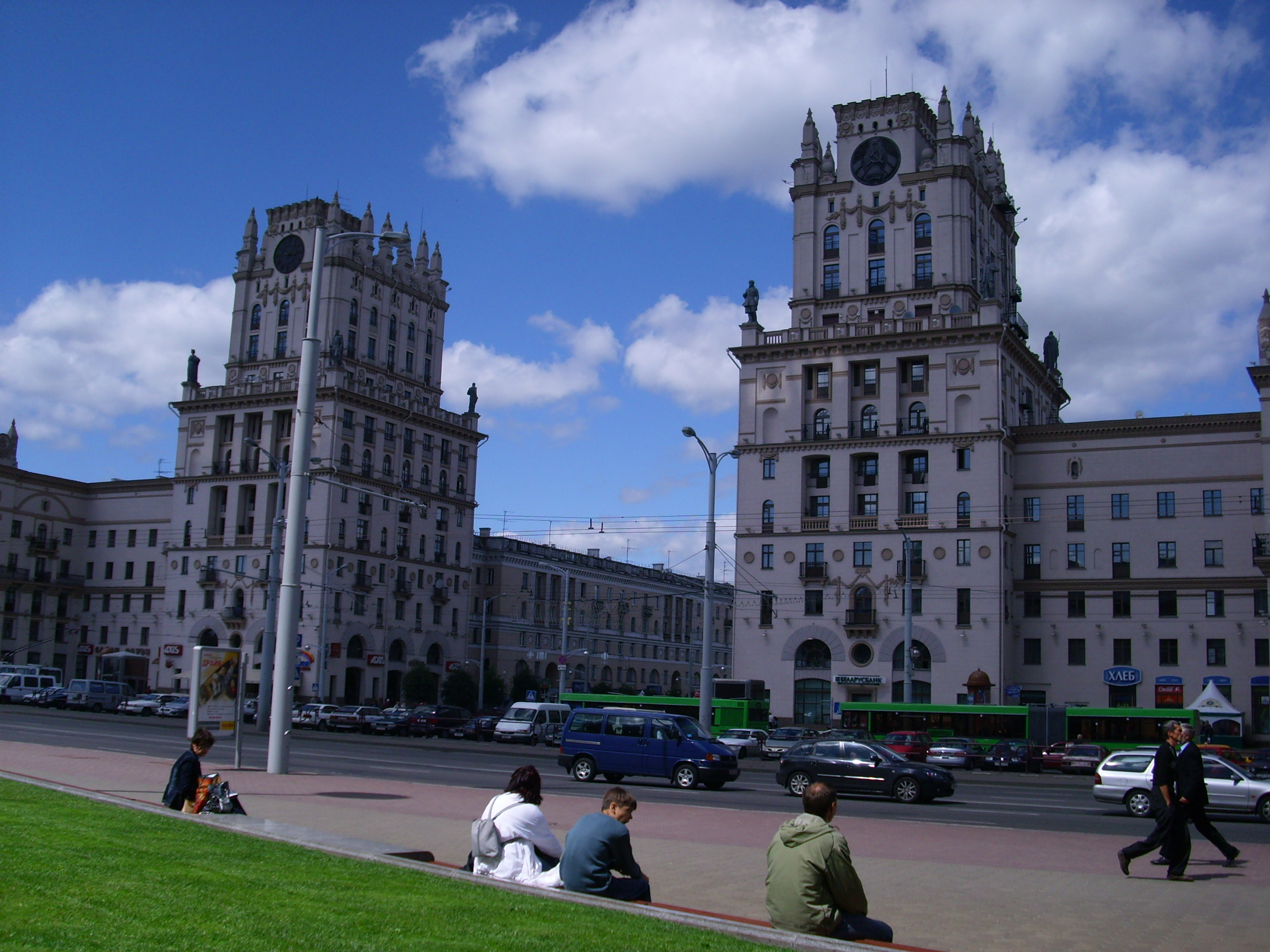 Logement au centre de Minsk, en face de la gare